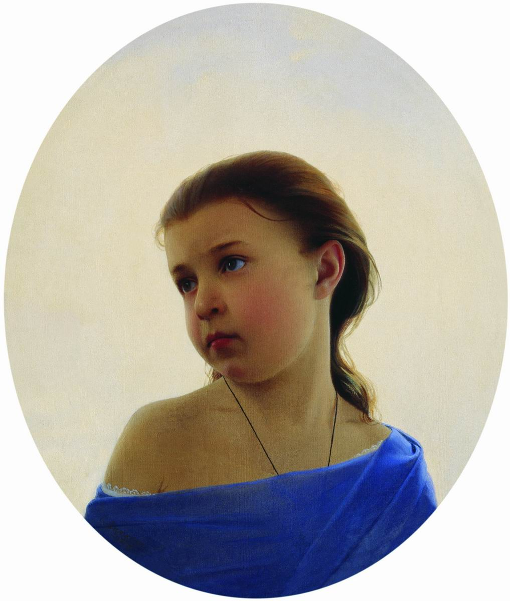 Девочка в голубом платье. Портрет Наталии Зарянко, дочери художника 1870